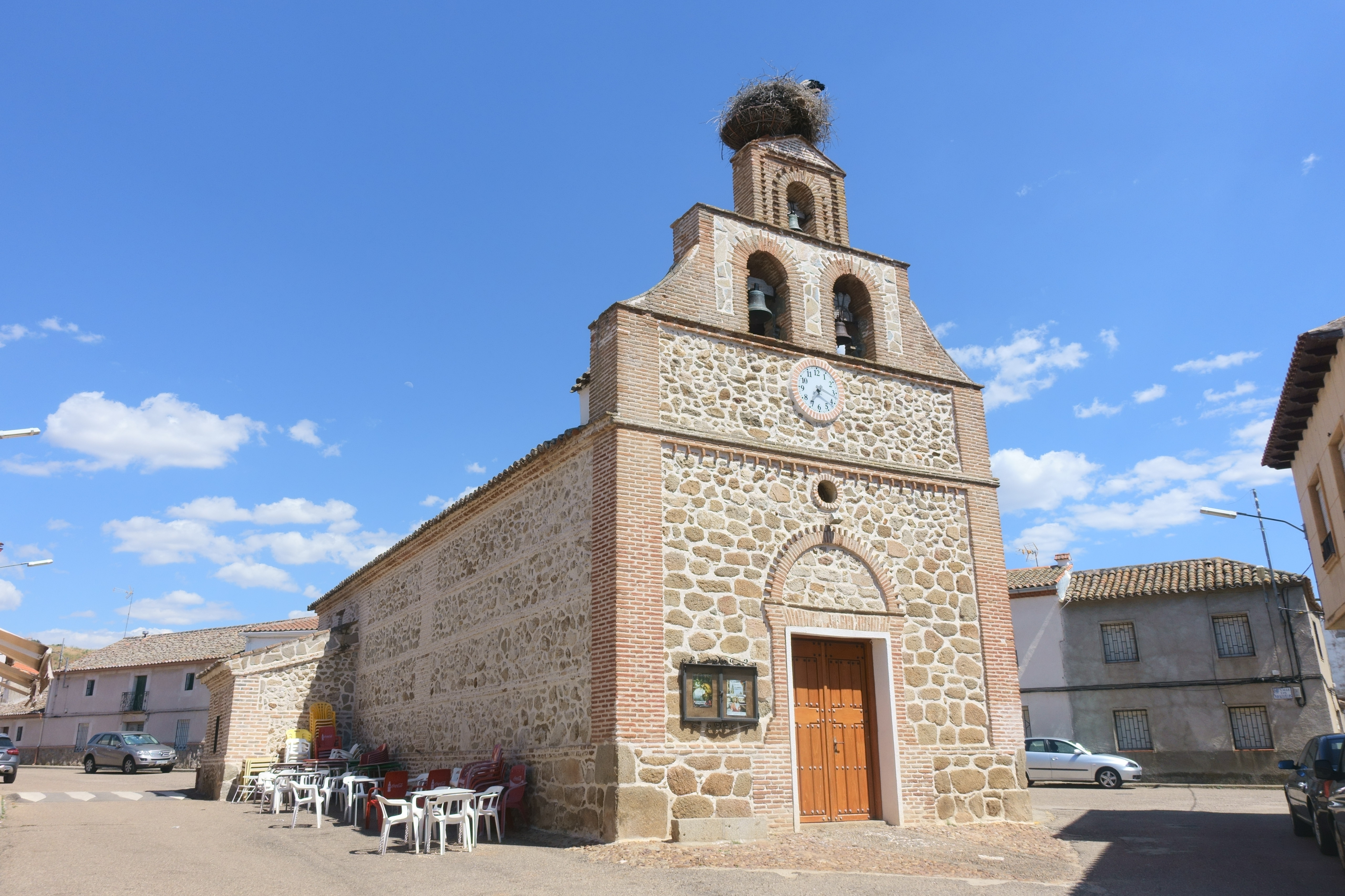 Iglesia de la Inmaculada Concepción, Retamoso de la Jara (Toledo, España).